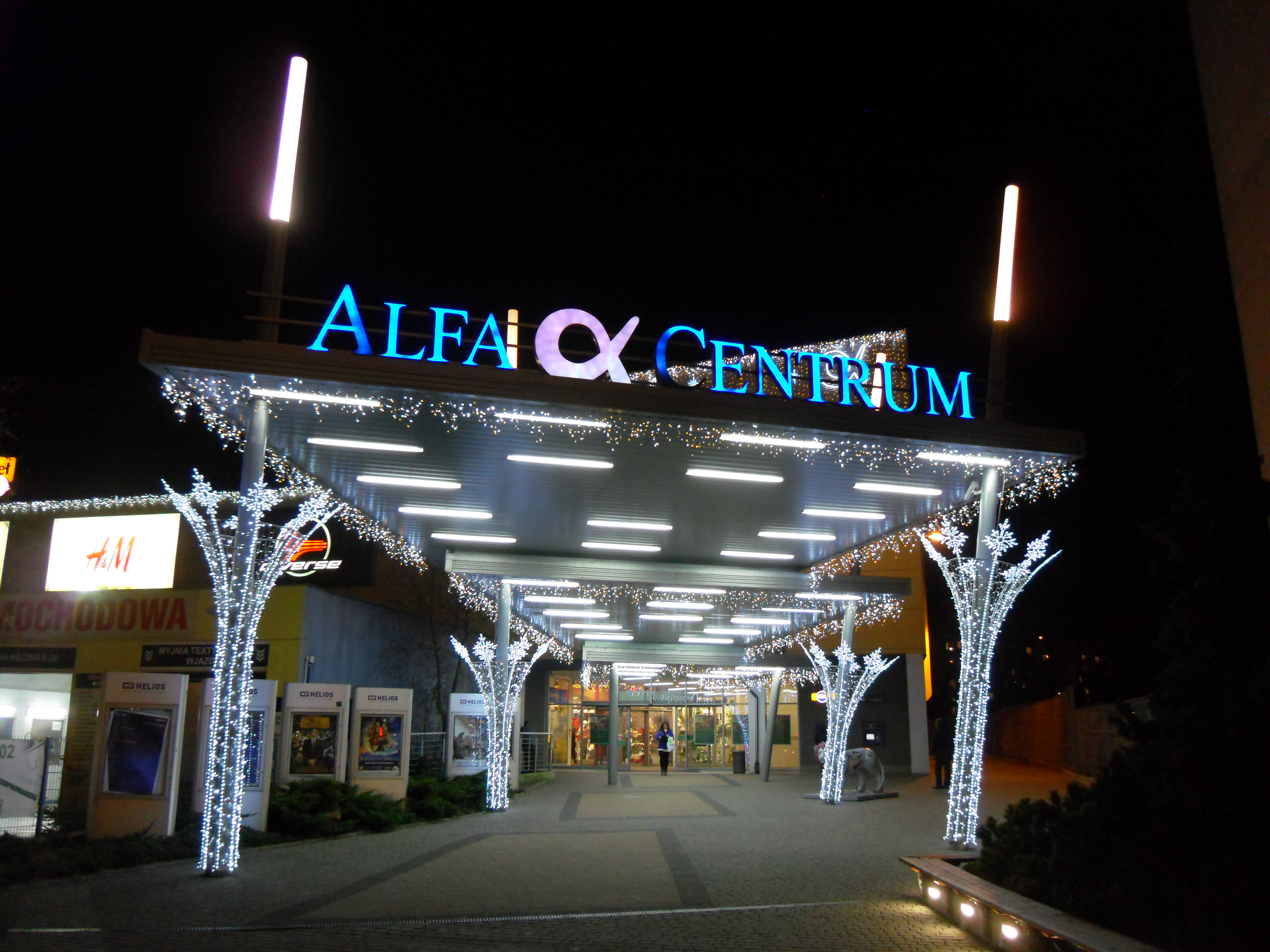 Gdańsk Przymorze. Centrum handlowe Alfa Centrum, wejście główne, dekoracja świąteczna.